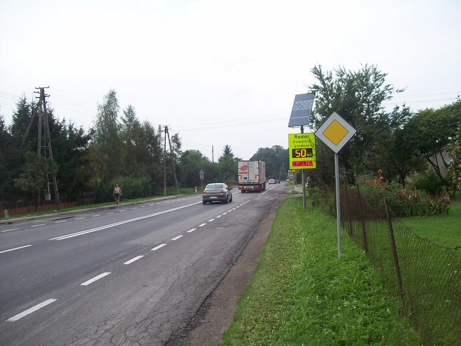 Droga krajowa nr 19 w Niedrzwicy Kościelnej, woj. lubelskie